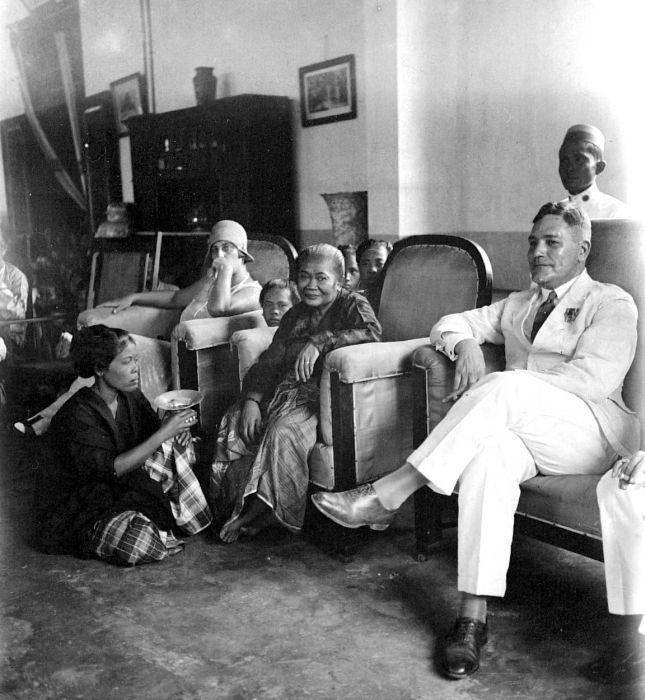 Foto negatif. Datu dari Luwu. Duduk di sebelah kirinya adalah Prof. Dr. B. Schrieke, masa itu (1932) menjabat sebagai direktur pendidikan dan kepercayaan di Palopo, Sulawesi Selatan.